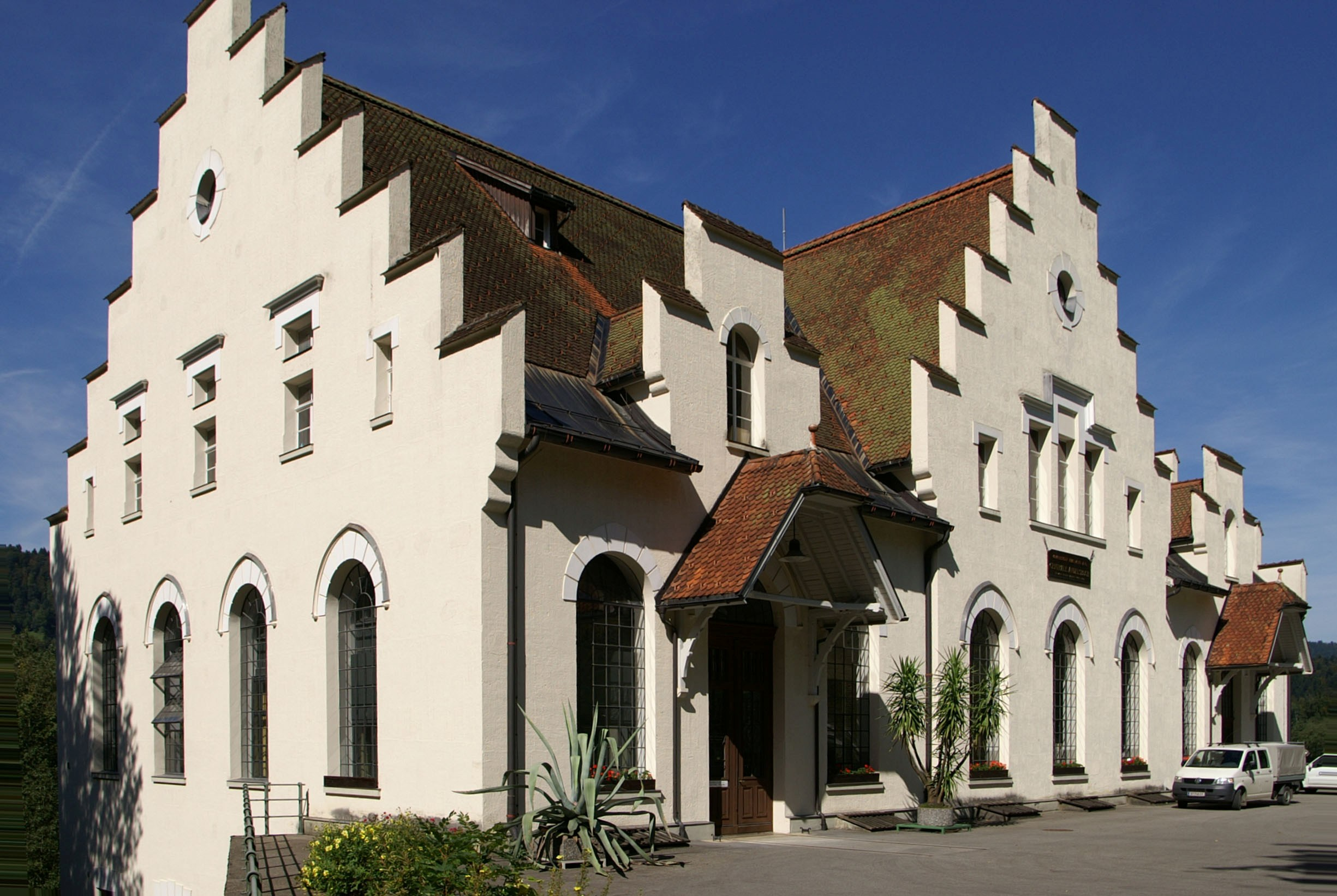 Kraftwerk der Vorarlberger Kraftwerke in Andelsbuch Jugendstil-Stufengiebelbau der Vorarlberger Kraftwerke von 1908. Mit der damaligen Leistung von 10.000 PS war es das größte Elektrizitätswerk Österreichs. Gesamtkomplex mit Stausee, Wehranlage, Druckrohrleitung, Umspannwerk, Unterwasserkanal und Krafthaus mit fünf Turbinen. 51 Mio kWh Jahreserzeugung.